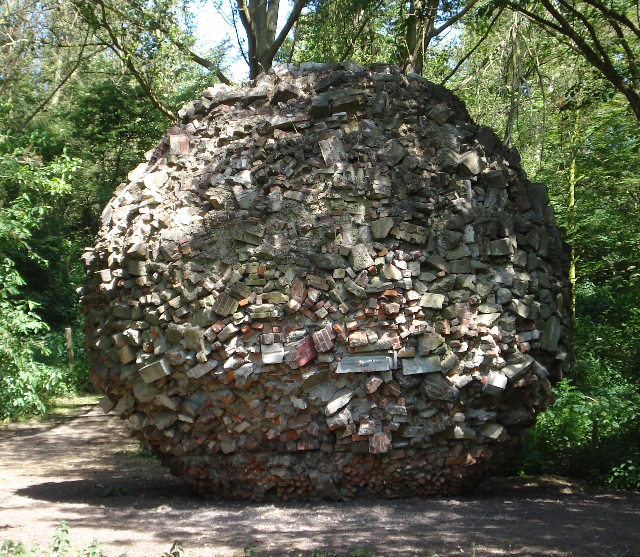 Den Haag, Wijndaelerduin. Kunstwerk "Puinbal" van Donald Duk. Den Haag/The Netherlands.